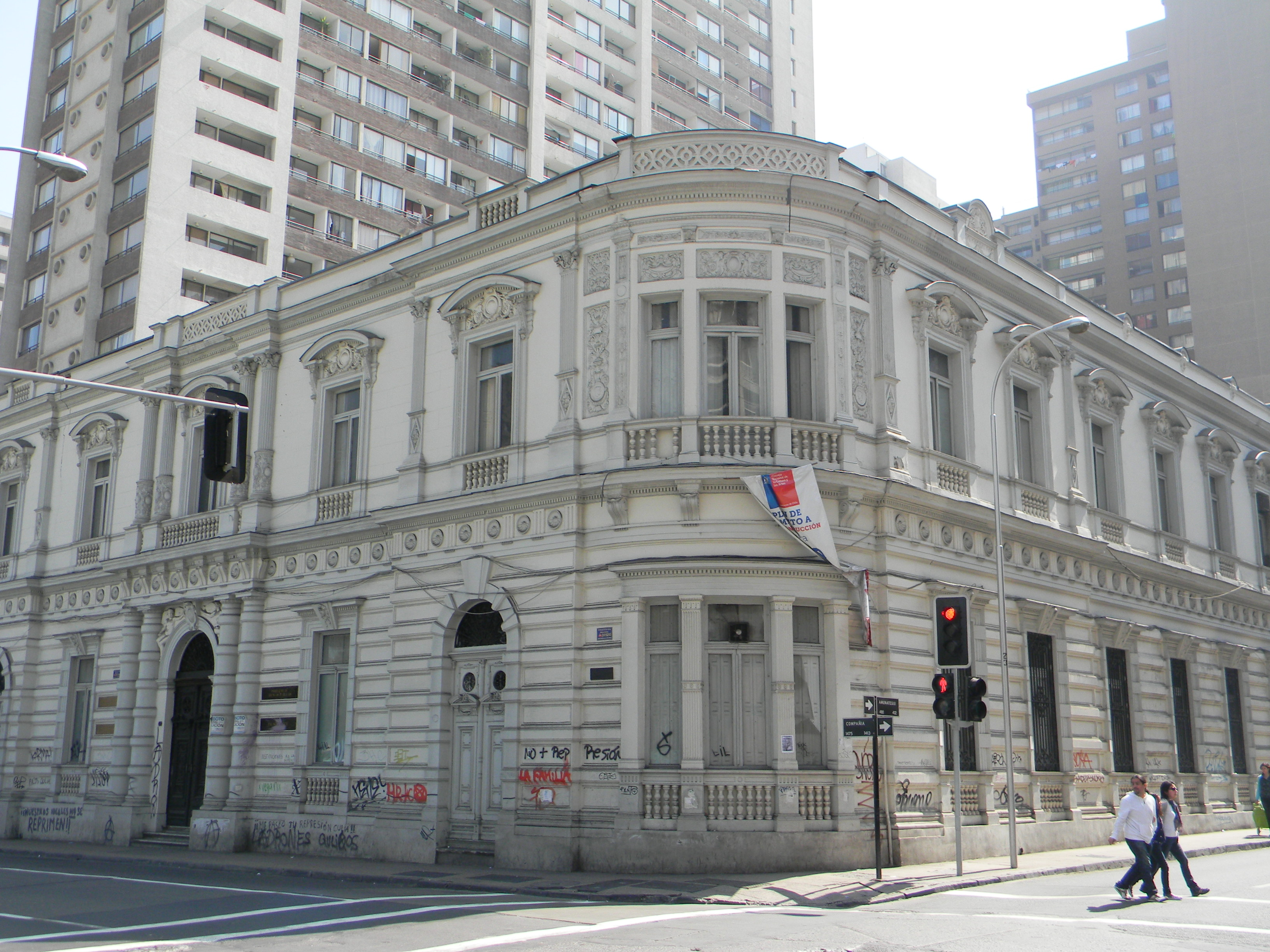 Ubicada en la calle Compañía 1413, la construcción es uno de los pocos palacios grandes y con historia que aun se mantienen en el perímetro del centro- centro, entre los altos edificios de la capital. Su propietario actual es la Universidad de Chile, donde funciona la Escuela de Gobierno y Gestión Pública desde el año 1993, la que ha hecho algunas modificaciones para tales efectos. This is a photo of a national monument in Chile: 889